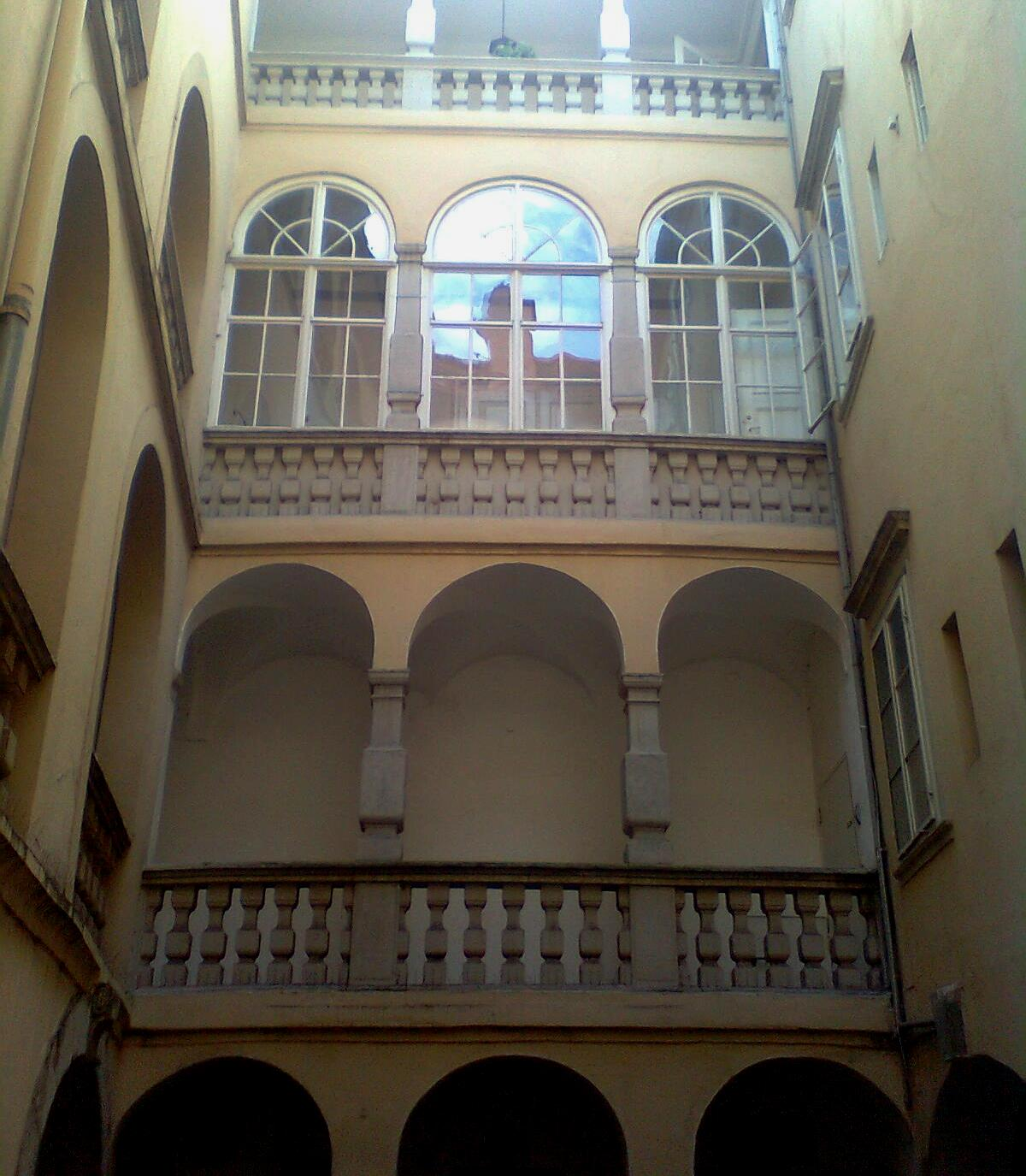 Innenhof des Grazer Palais des Enffans d´Avernas